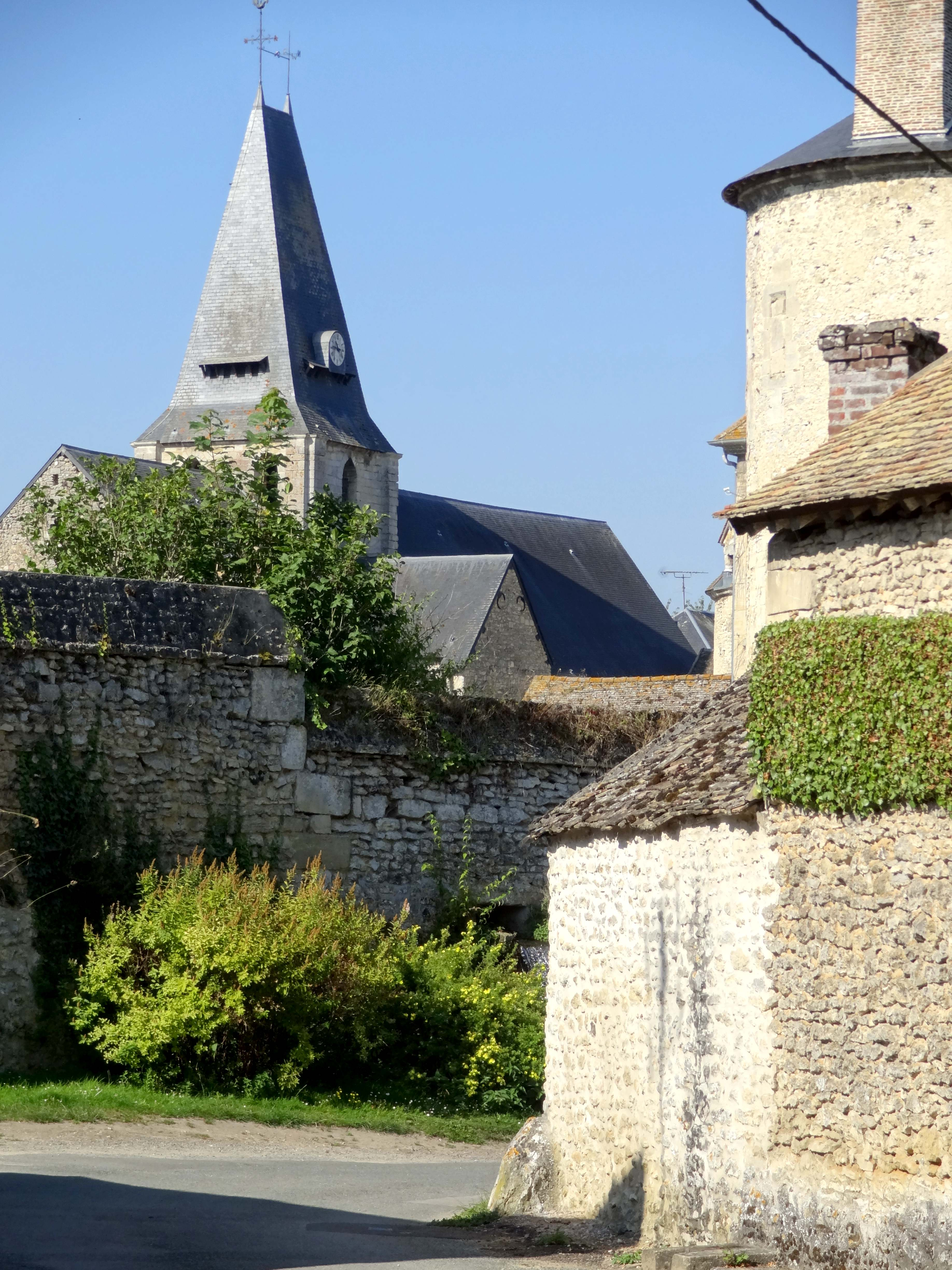 Boury-en-Vexin - voir titre.